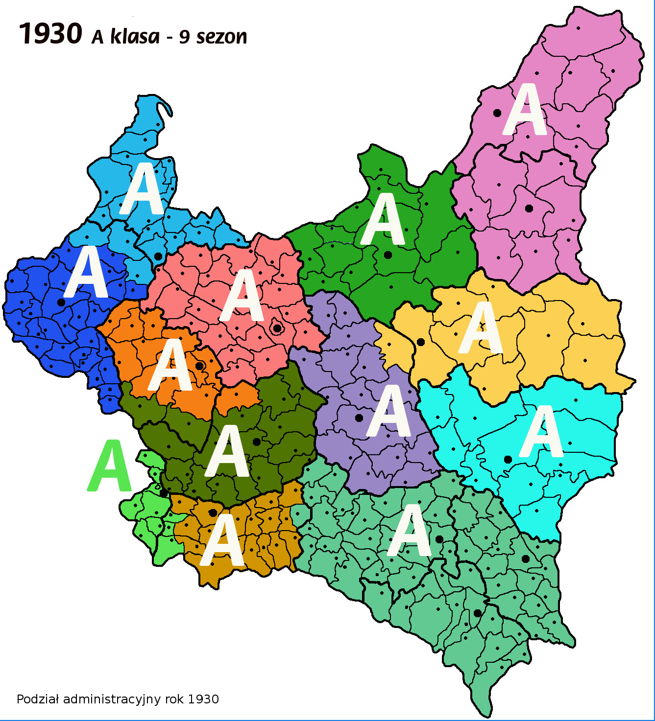 1930 rok A klasa